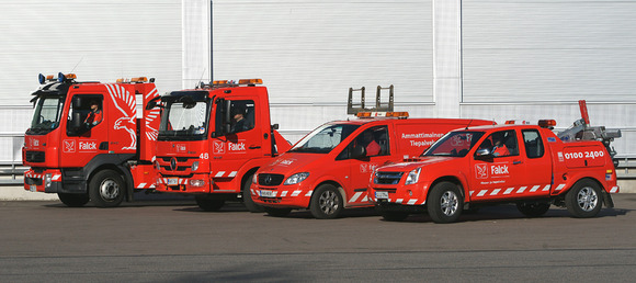 Falck hinausautot